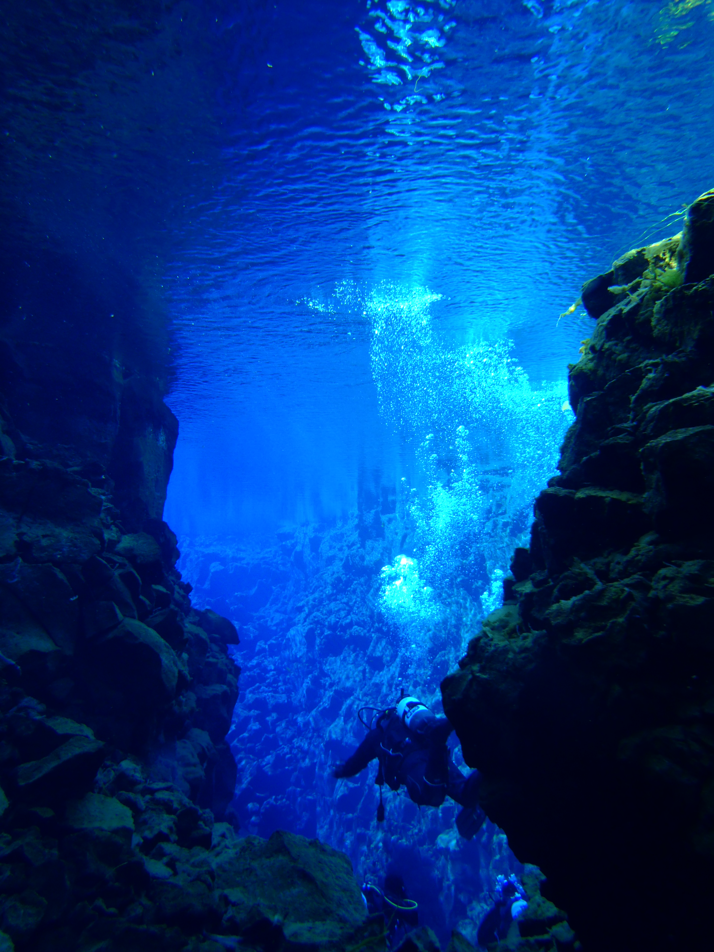 SCUBA diver in Silfra Iceland.